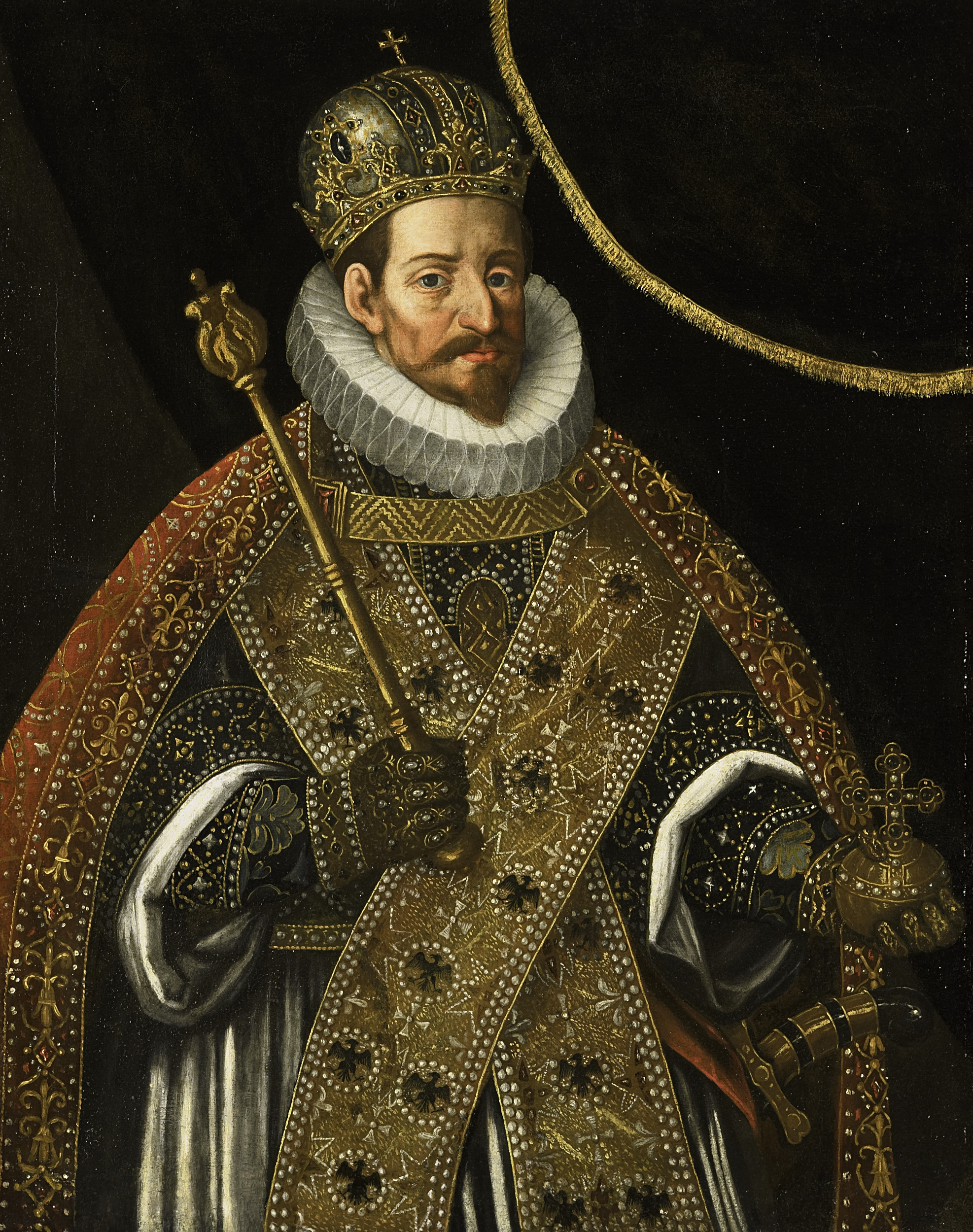 Portret van Matthias, Duits keizer. Staande ten halven lijve, met scepter, keizerskroon en rijksappel.